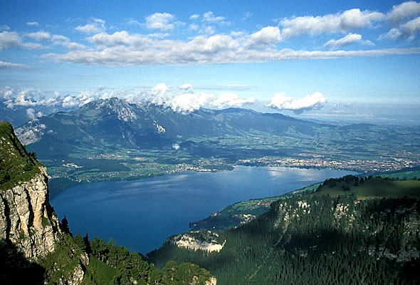 Blick vom Niederhorn auf den Thunersee und Thun